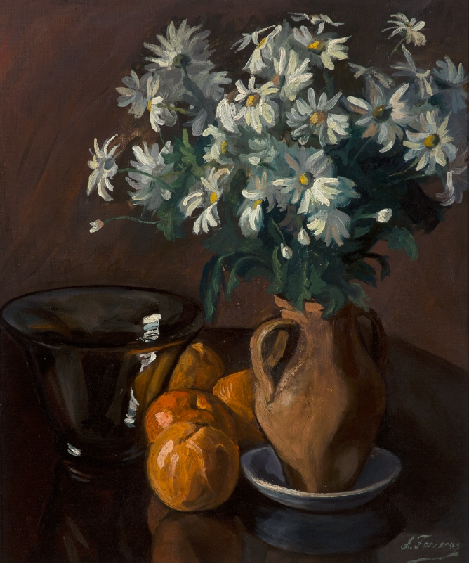 Flors Antònia Ferreras Betran, c. 1935 Oli sobre tela, 48 x 41 cms MAMLL - 0606